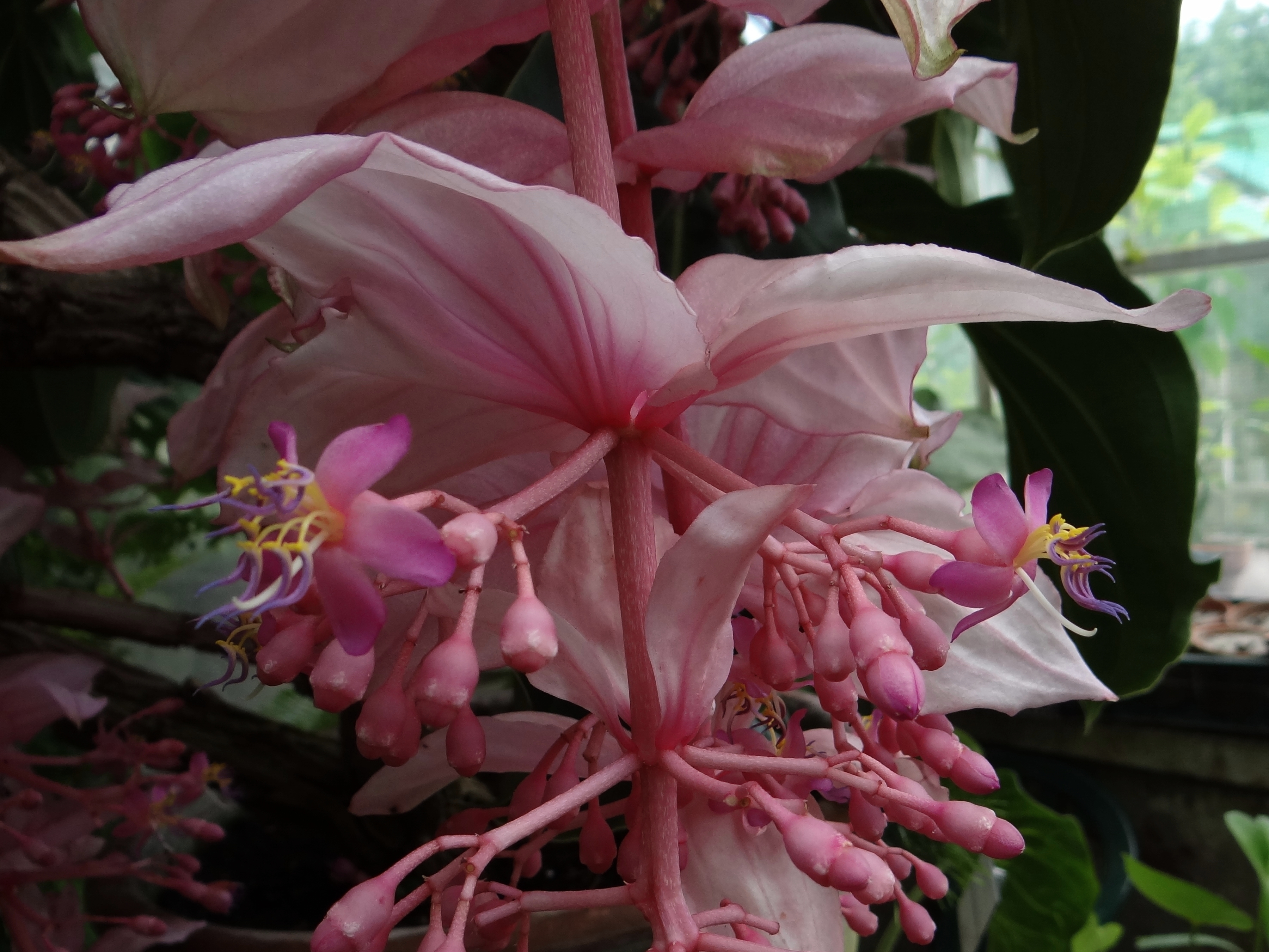 Medinilla magnifica (location:Botanical Garden in Cracow)